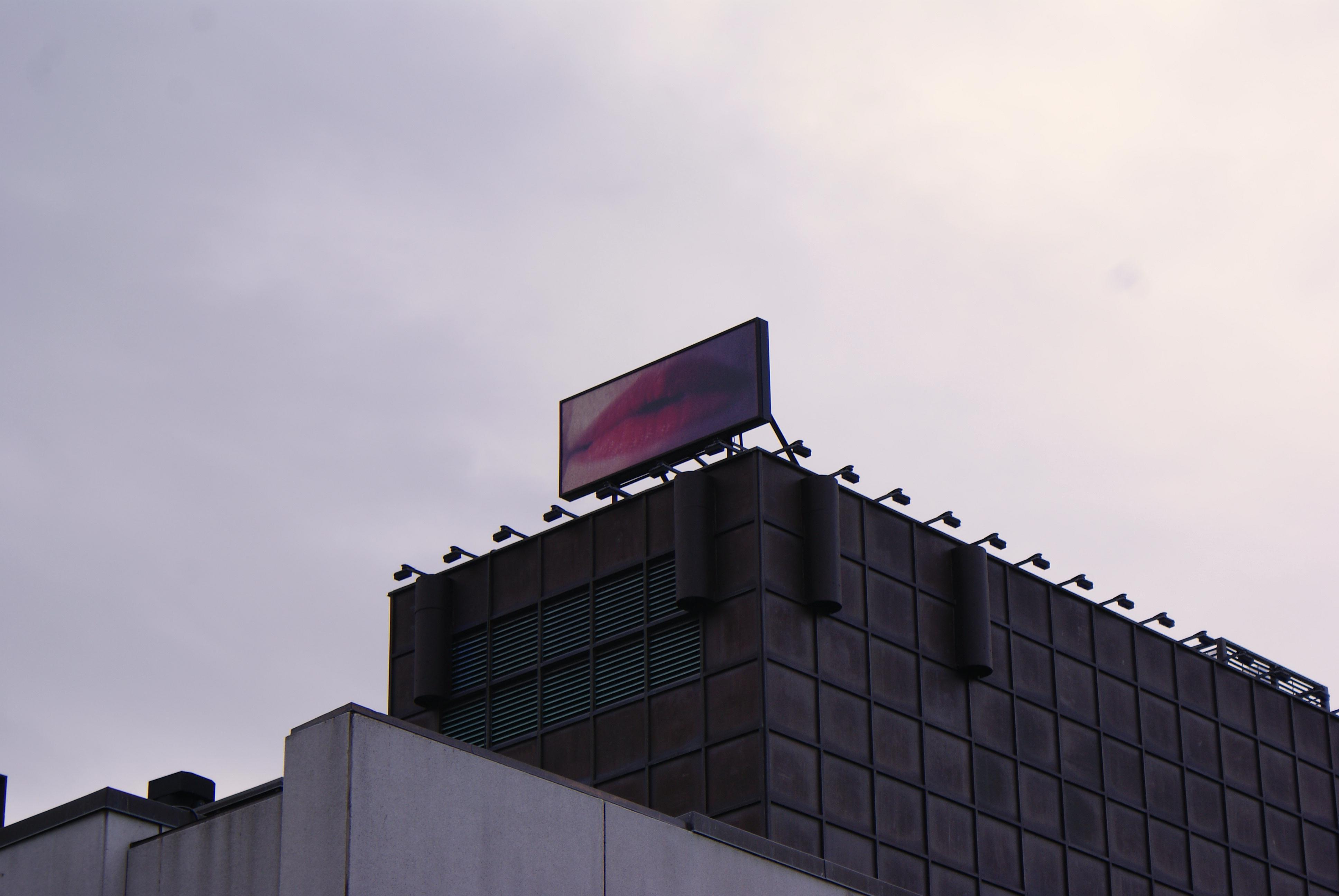 Geneviève Cadieux, La Voie Lactée, 1992, Installation photographique, 1m83 x 4m57, Musée d'art contemporain de Montréal. Crédits photographiques : Evelyne Awaad